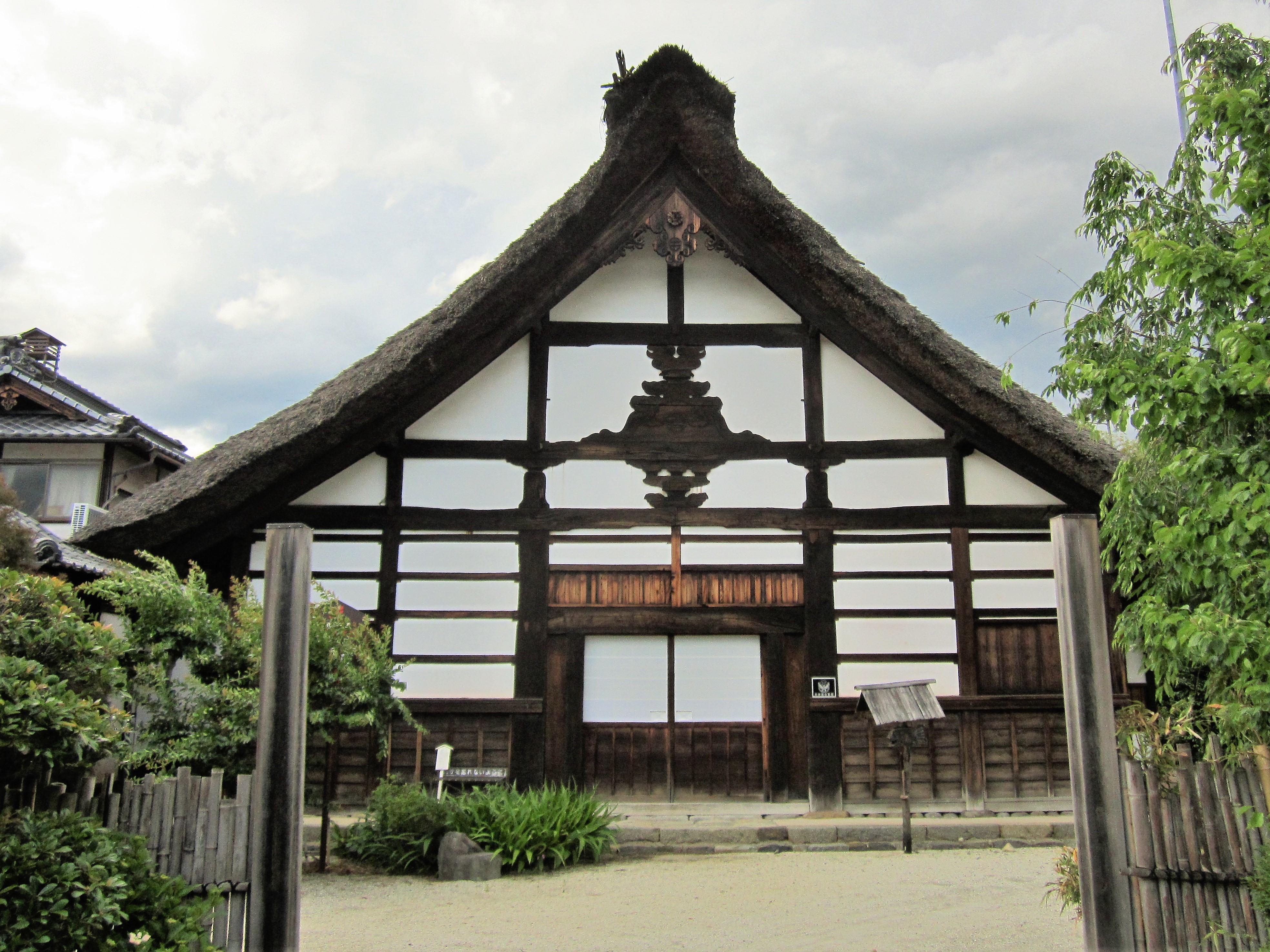 清白寺庫裏（山梨市三ケ所）